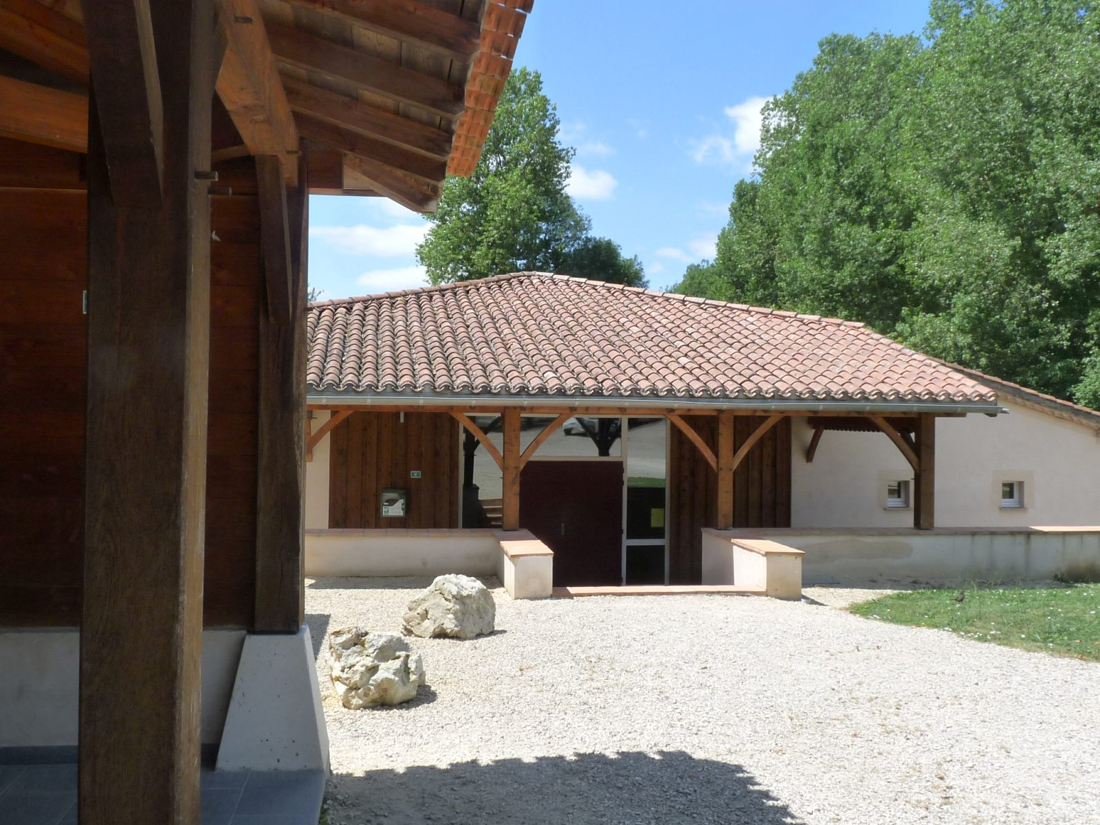 Mairie de Fargues-sur-Ourbise, Lot-et-Garonne, France